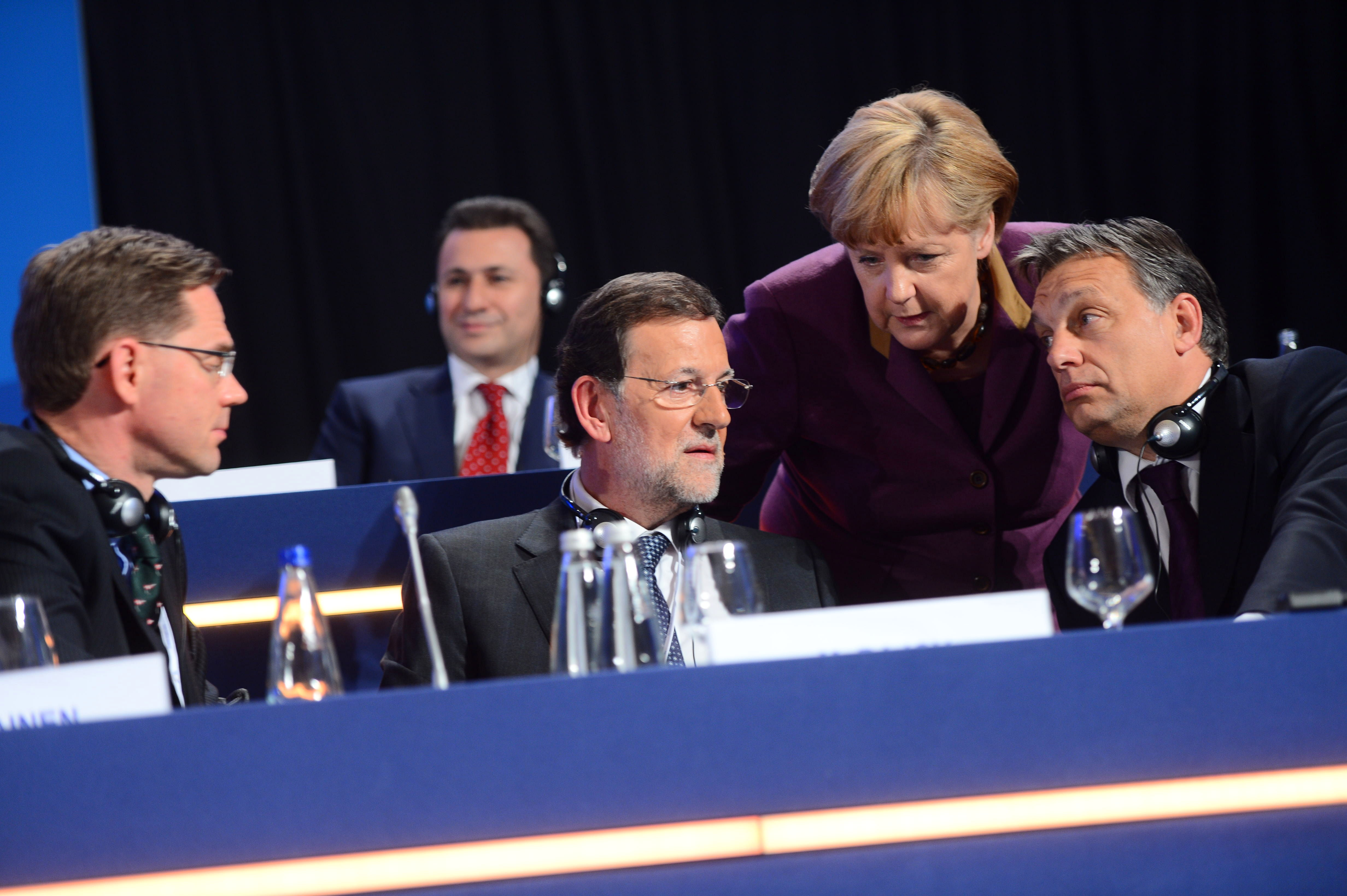 Angela Merkel